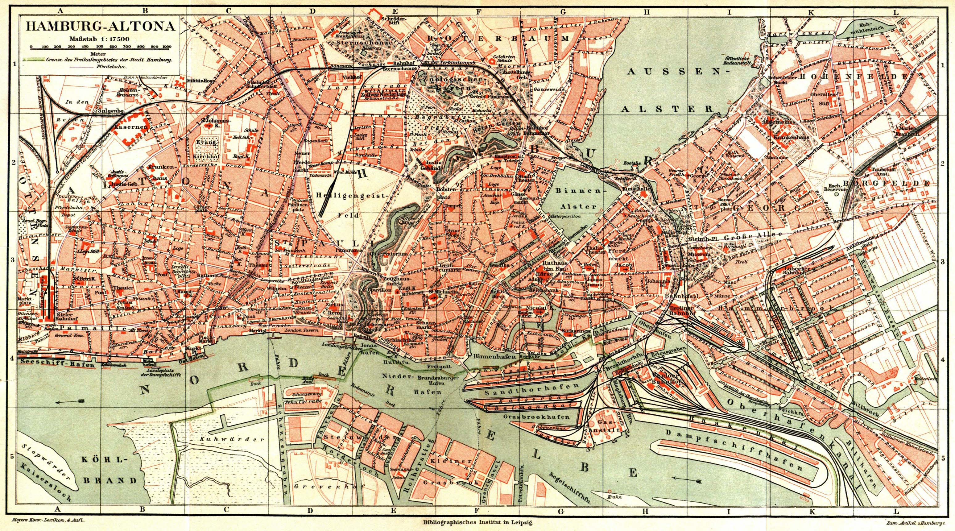 Stadtplan von Hamburg-Altona (1 : 17.500)